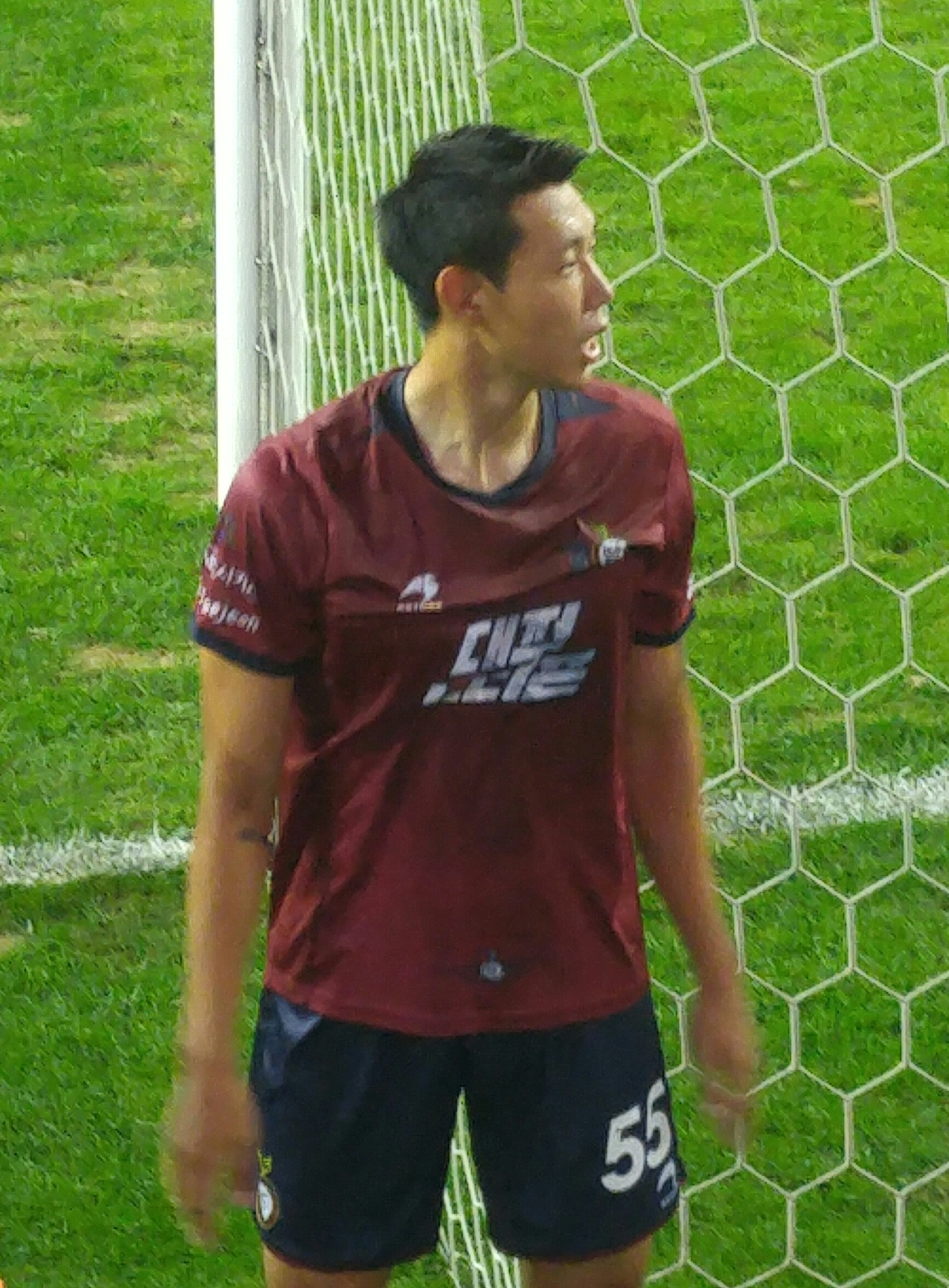 대전시티즌 소속 윤준성